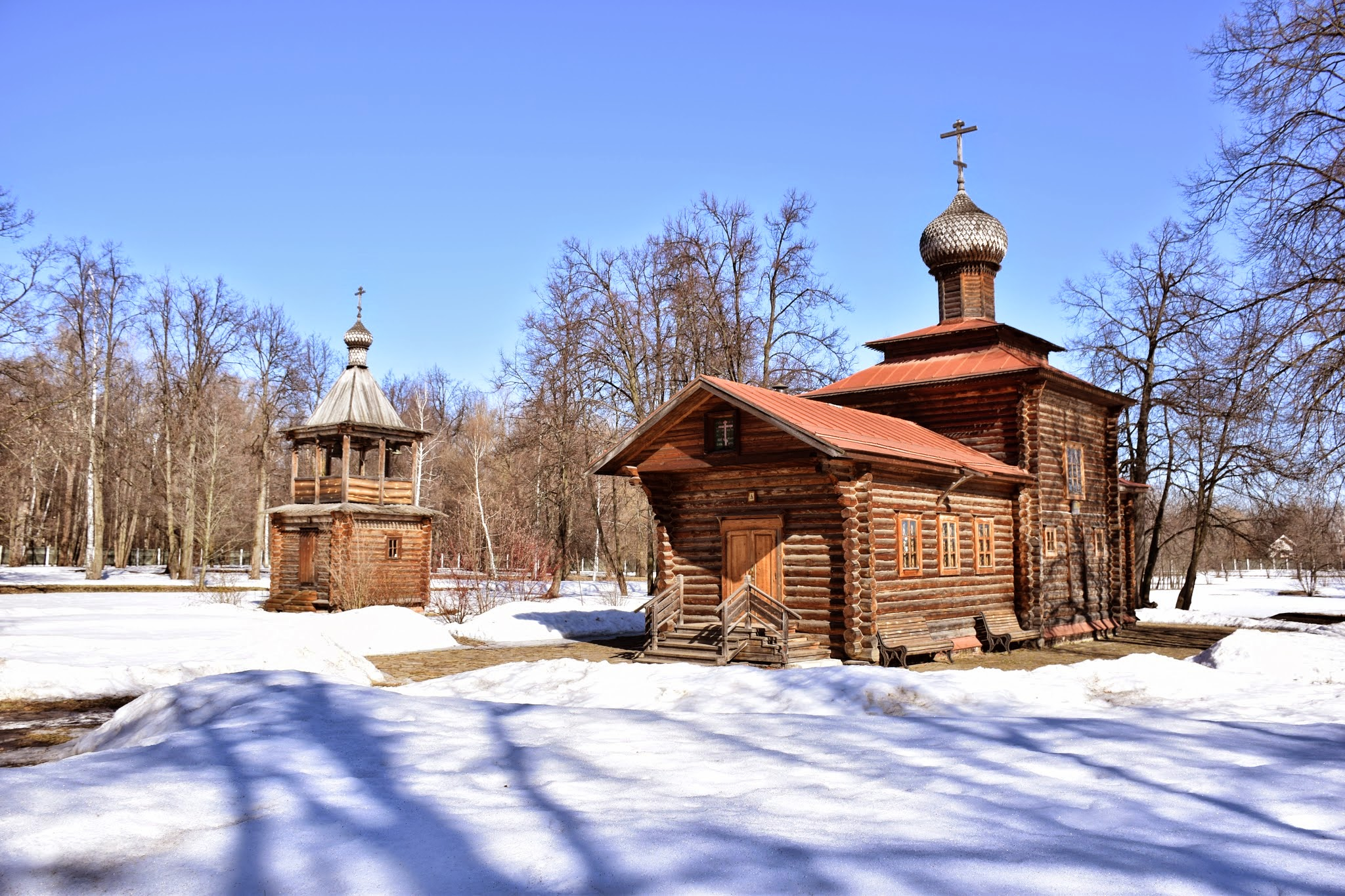 Бутовский полигон: Юбилейная улица, Дрожжино, Ленинский район, Московская область